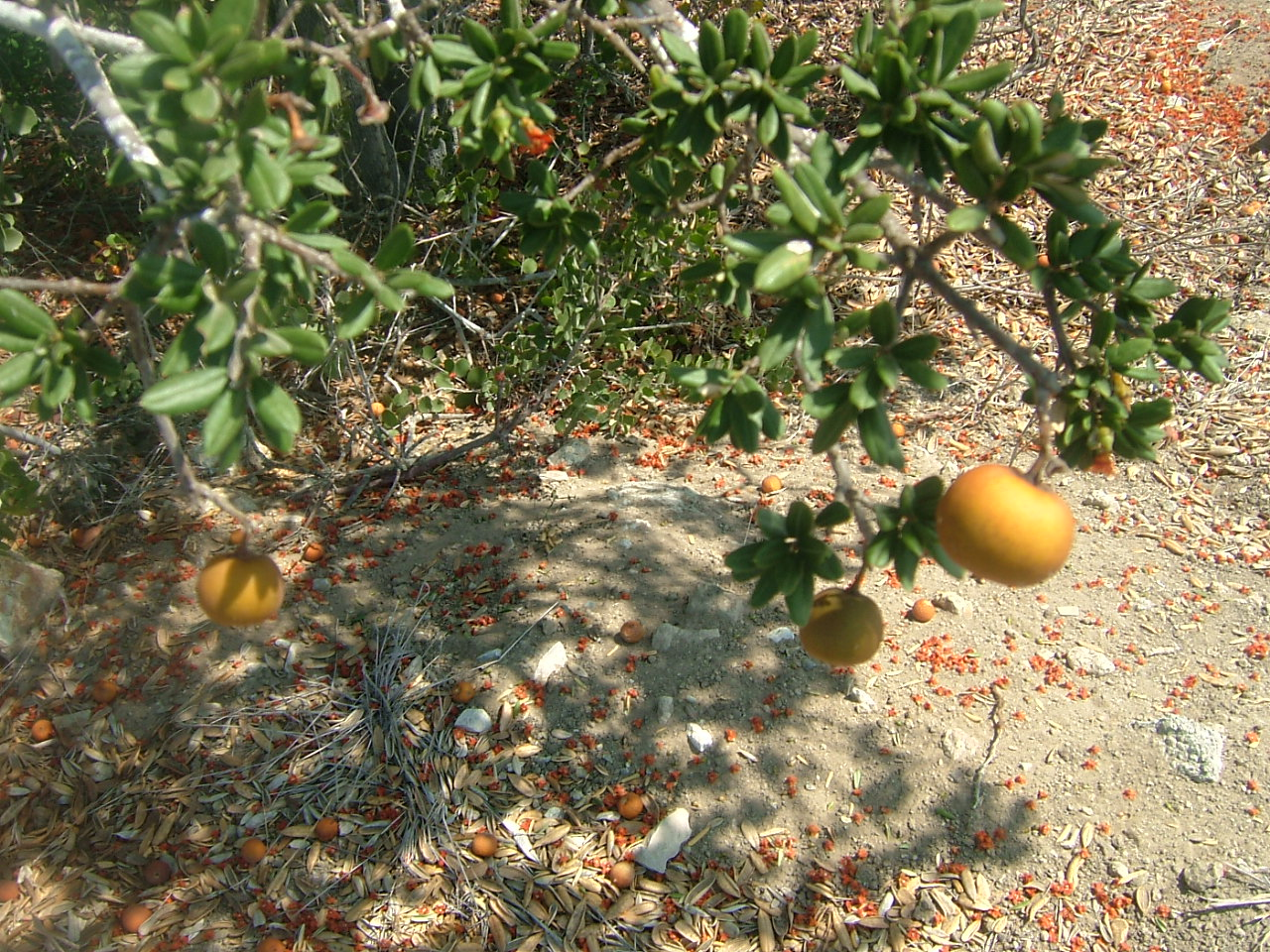 Fruto maduro